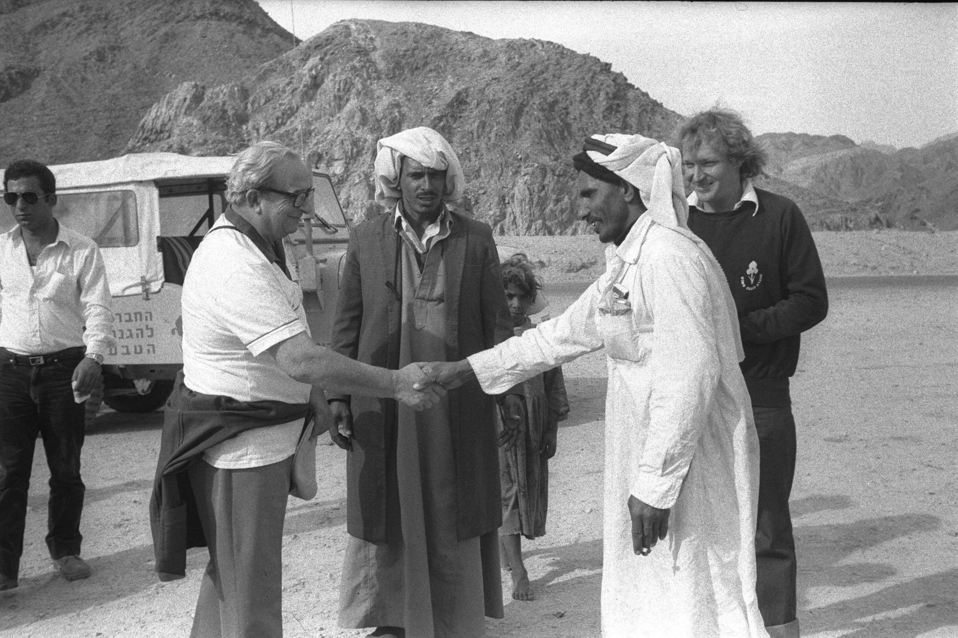 Pres. Yitzhak Navon meeting Bedouins during his visit to Sharm El Sheikh as guest of the nature preservation society (24/12/1981). ביקור נשיא המדינה יצחק נבון ורעייתו אופירה בשארם אל שייח. בצילום, נשיא המדינה נפגש עם תושבים בדואים. Photo: ZEHAVI NATHAN.